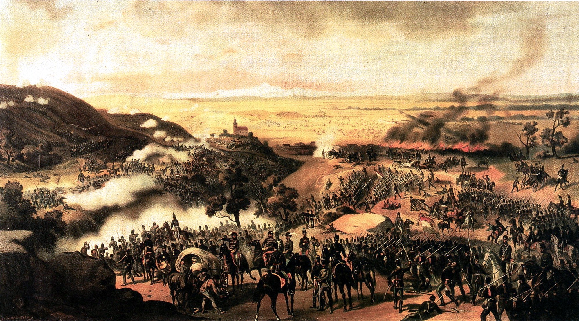 Az isaszegi csata 1849. április 6. Olajnyomat